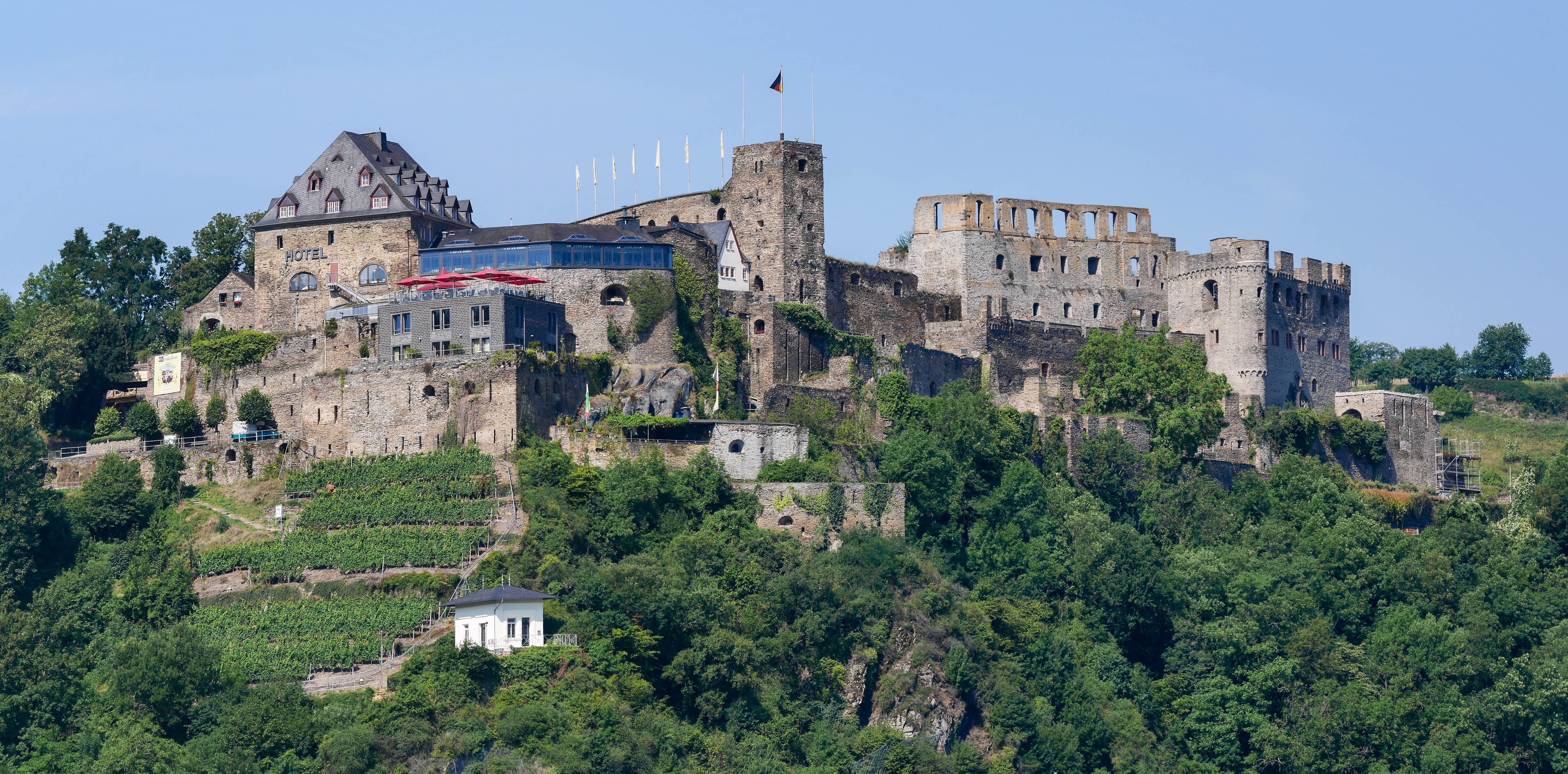 Bei der Burg Rheinfels handelt es sich um die ehemals größte Befestigung am Mittelrhein. Im Dezember 1692 wurde sie von 28.000 französische Soldaten angegriffen, wobei es über 4.000 Tote gab, wurde aber nicht erobert. 1796 wurde die Festungseigenschaft aufgehoben und vorgelagerte Befestigungswerke gesprengt. Seitdem ist sie Ruine. Diese Datei wurde mit Hugin erstellt